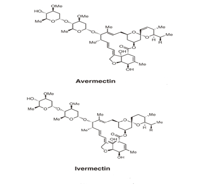 생명에 대한 독성때문에 Avermectin(위)은 이중결합 하나가 환원되어 독성이 약화된 Ivermectin(아래)의 변형체가 주로 사용된다.